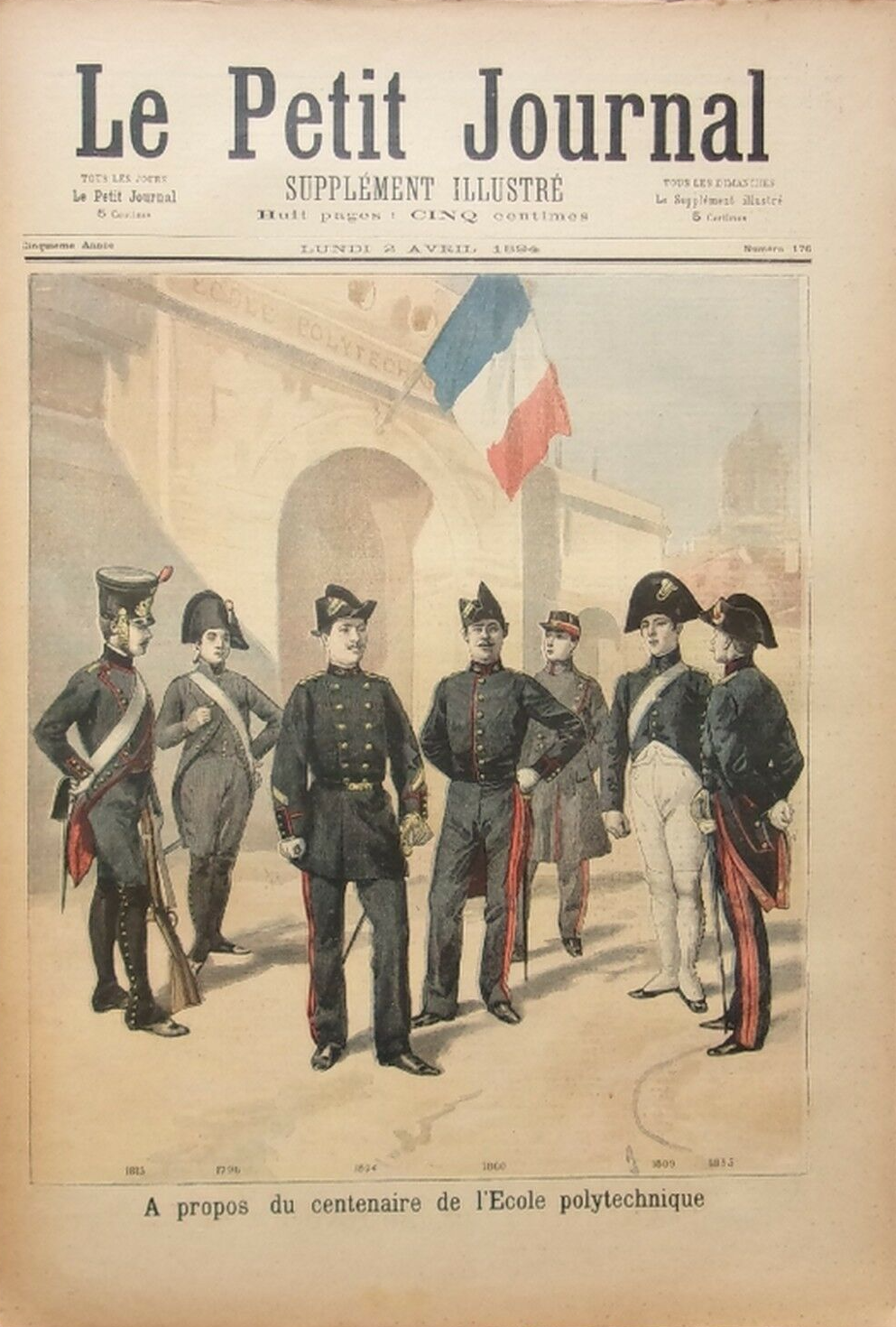 Couverture du Petit Journal du 2 avril 1894 à l'occasion du centenaire de l'École polytechnique. Représentation des uniformes depuis la création de l'École. Dates inscrites en bas de l'illustration.